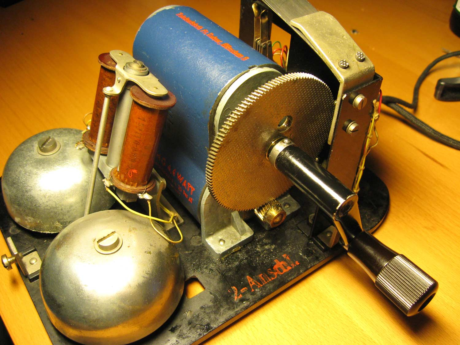 Kurbelinduktor im Telefon des Typs OB33, hier in der Ausführung der Firma Fr. Reiner Telefonfabrik München